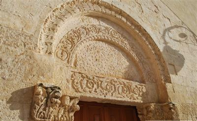 Descrizione: Chiesa di San Cirillo,portale romanico Autore: Domenico Sergio Antonacci Data pubblicazione: 12/12/2009